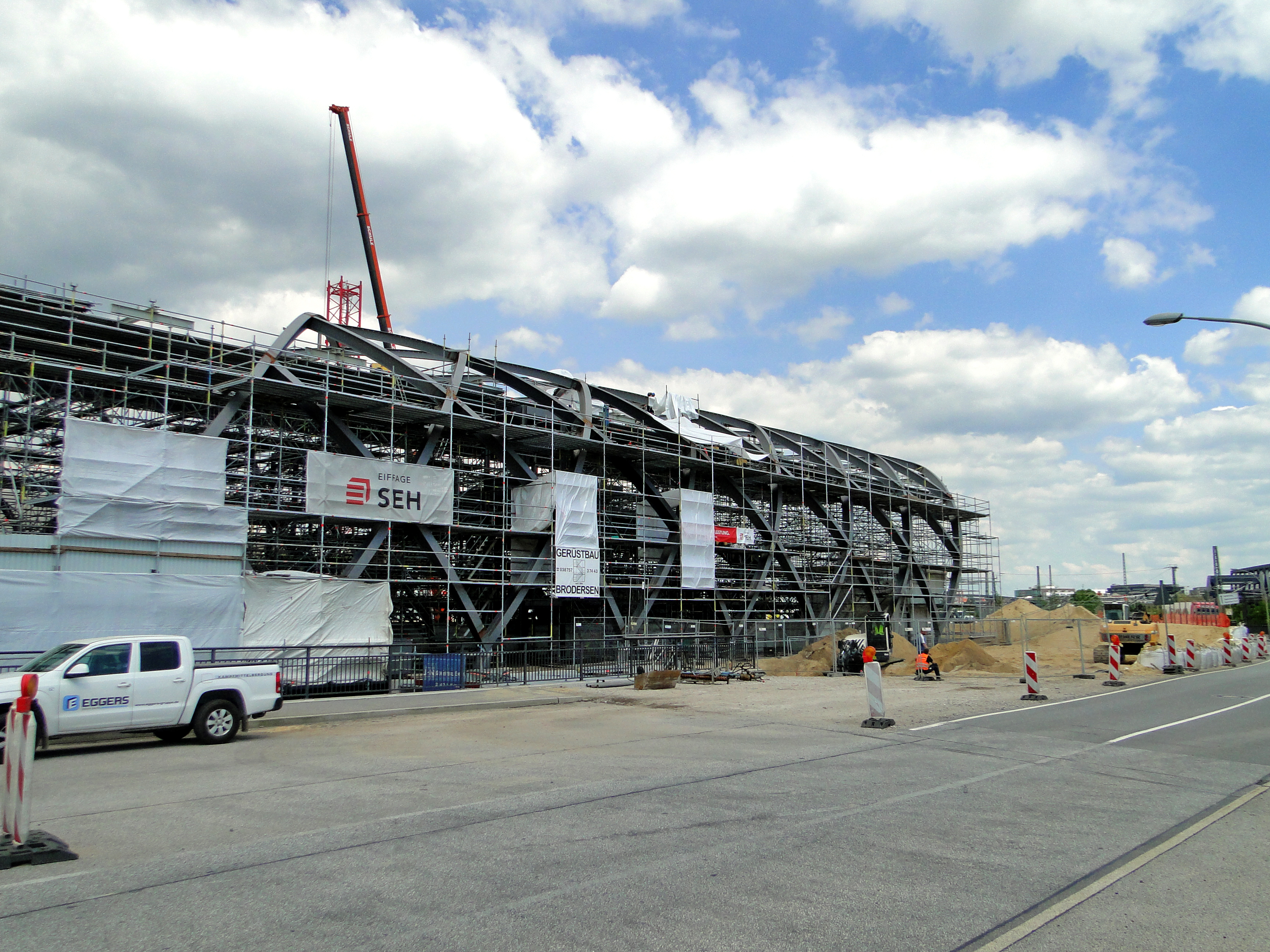 Bahnhofshalle des in Bau befindlichen U-Bahnhofs Elbbrücken im Elbtorquartier der Hamburger-HafenCity. Aufnahme in Blickrichtung Nord Westen auf die Nord Ost Seite der Bahnhofshalle